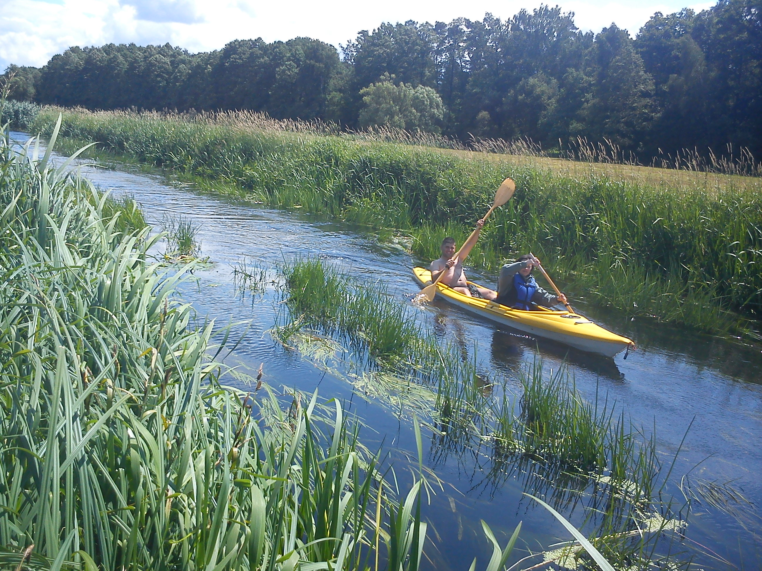 Wełna, spływ kajakowy.